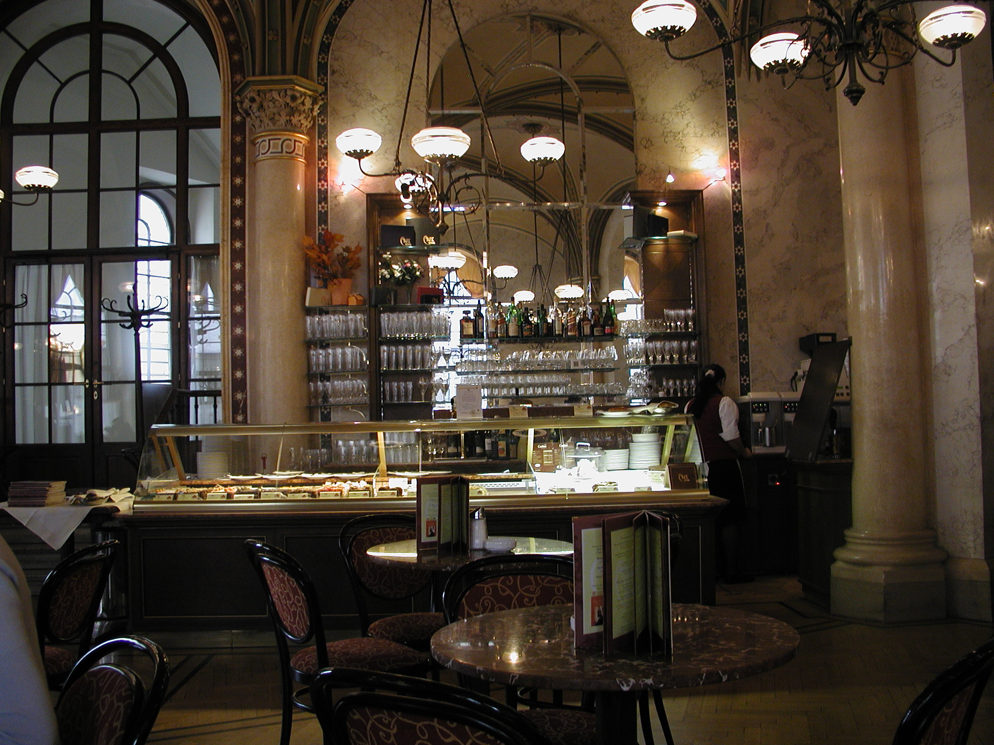 Café Central, Wien